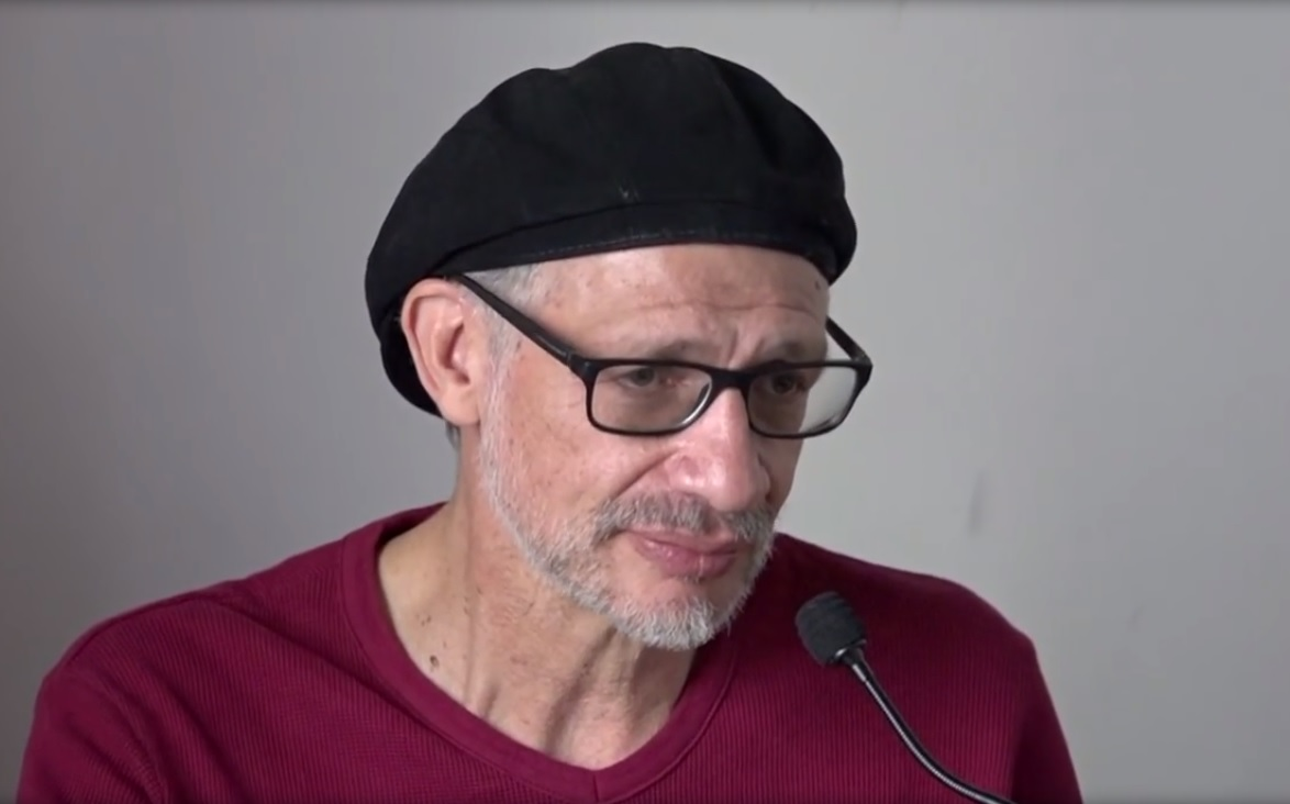 Slavoj Zizek y la crítica del historicismo posmoderno de Santiago Castro-Gómez. Presentación del libro en la librería "Traficantes de sueños" en Madrid.